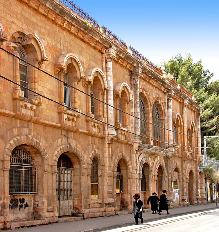 "הארמון" בשכונת הבוכרים